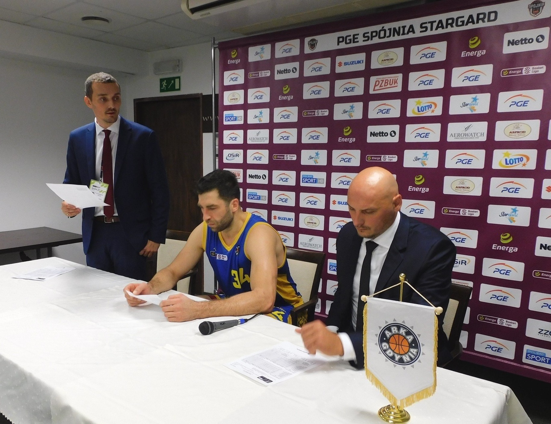 Konferencja prasowa (28.09.2019)